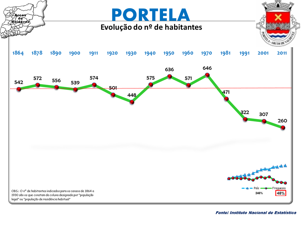 Censos 1864/2011